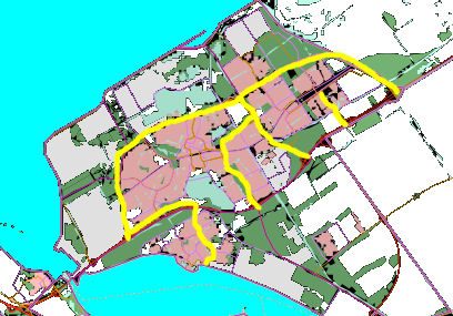 Een kaart met de Almeerse Stadsroutes (geel).